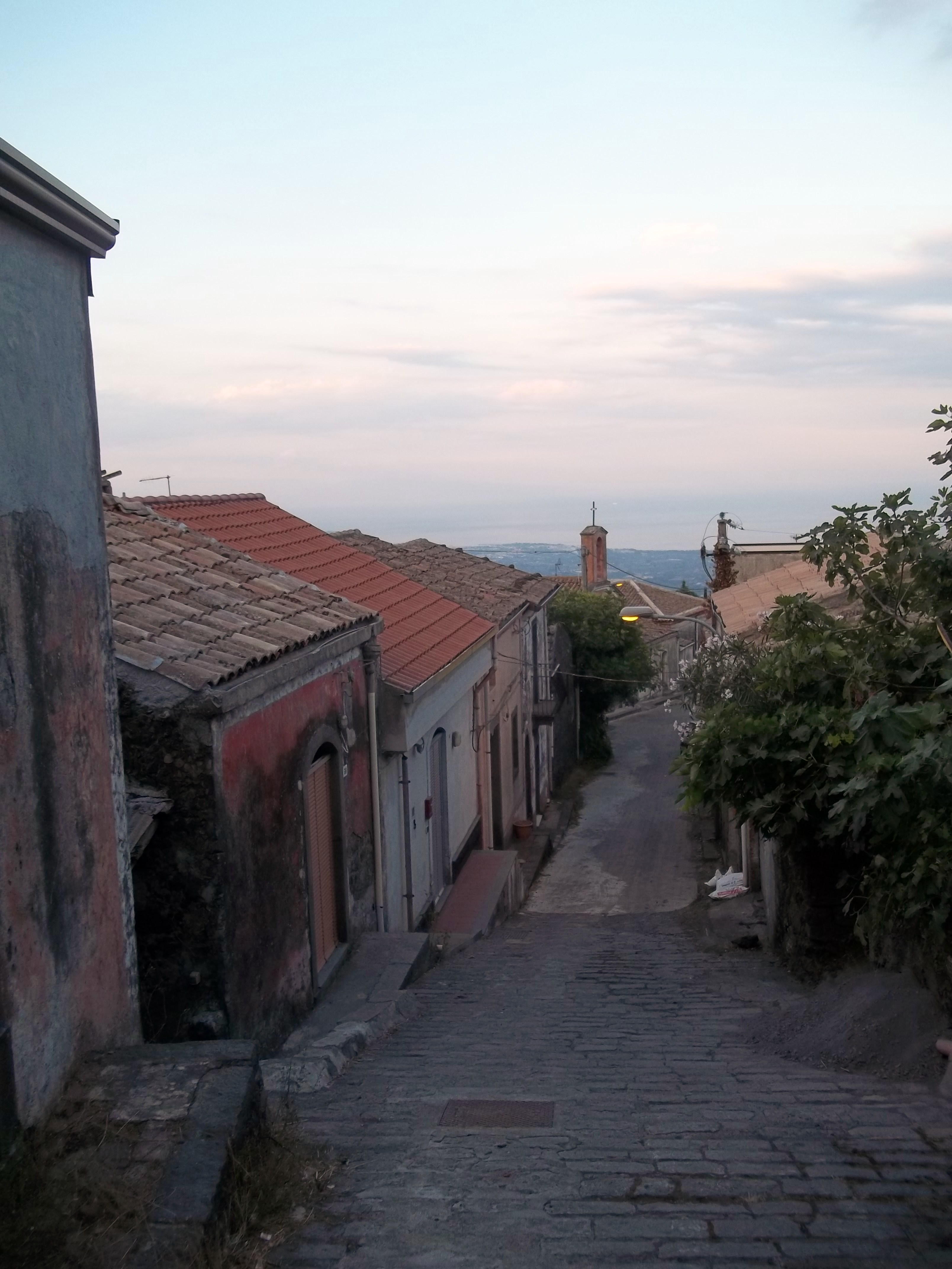 Presa superiore